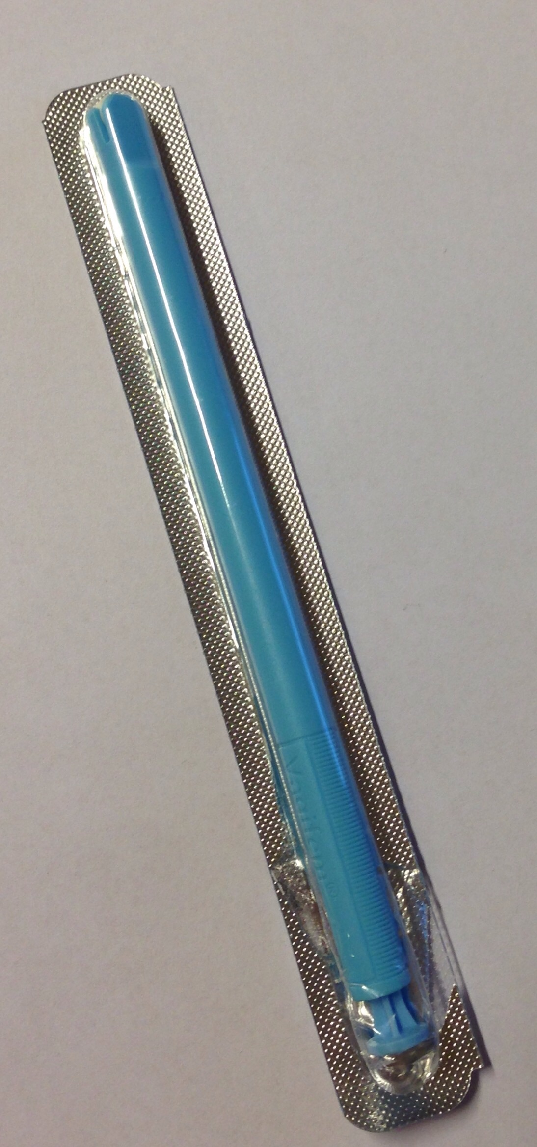 Vagifem